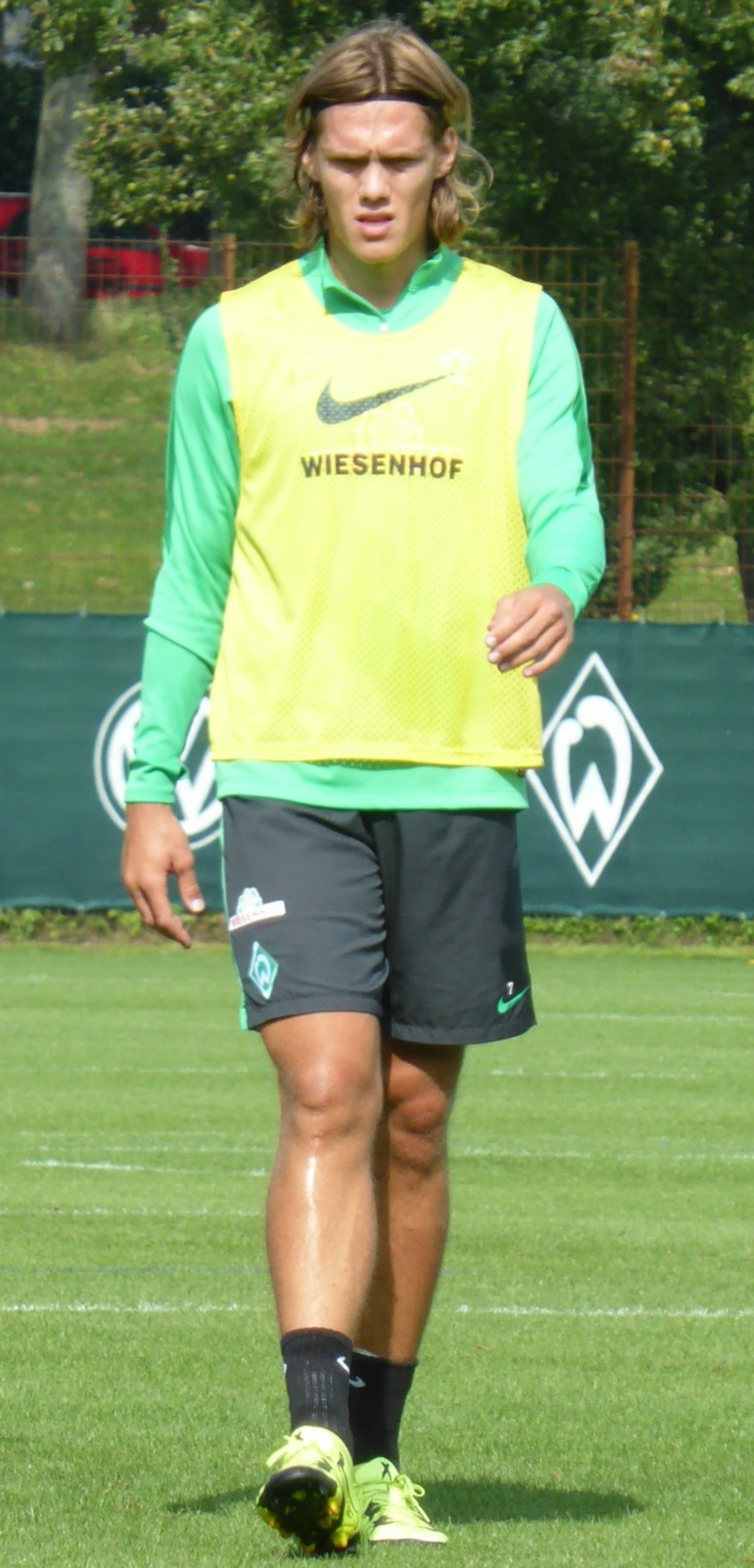 Jannik Vestergaard während eines Trainings in Bremen.